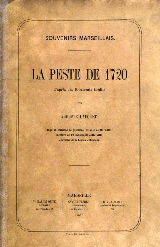 Souvenirs marseillais. La peste de 1720, d'après des documents inédits, par Auguste Laforêt, 1863.